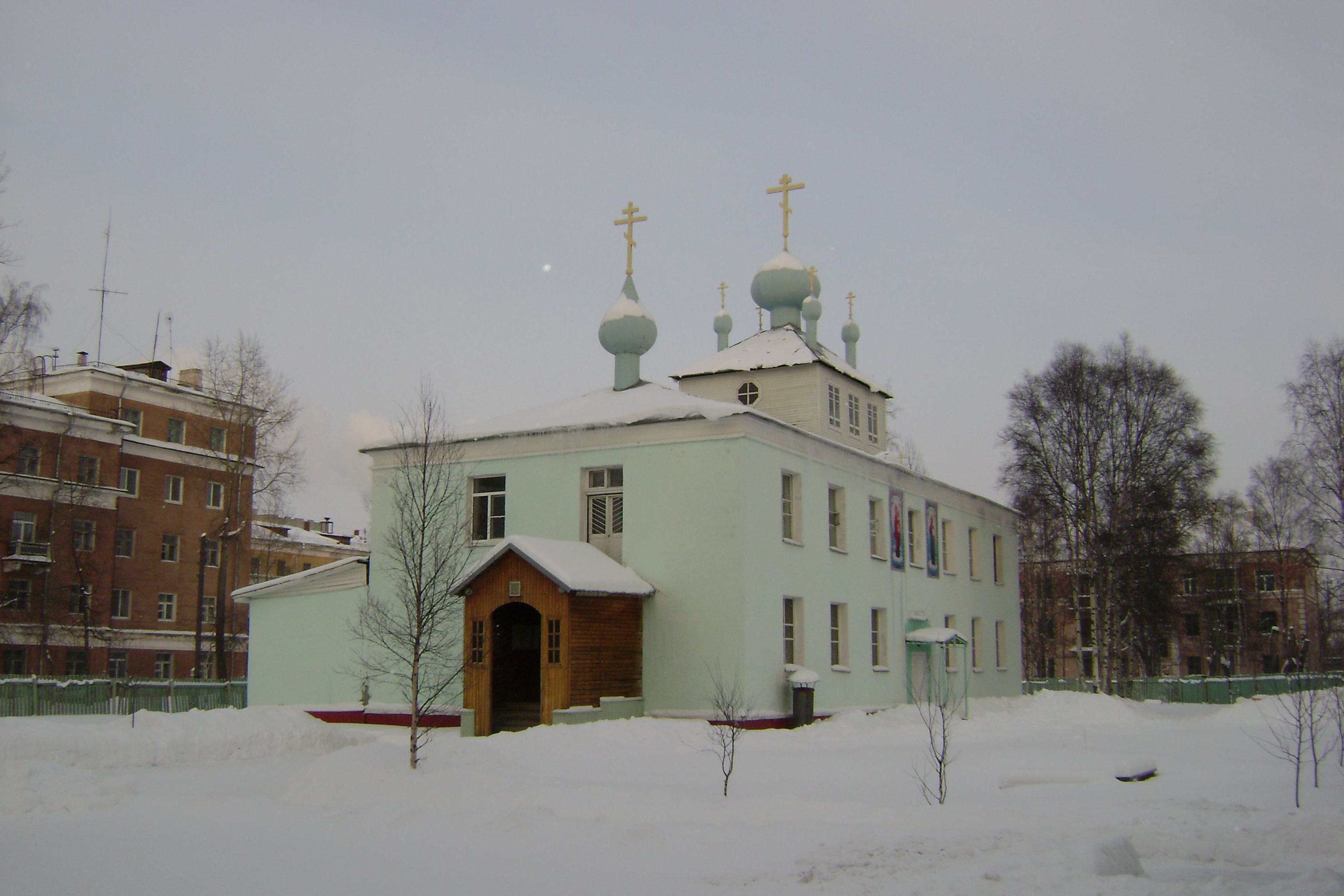 Храм Святителя Николая Чудотворца (Свято-Никольский Храм) - российский православный Храм города Северодвинска. Вид с юга.